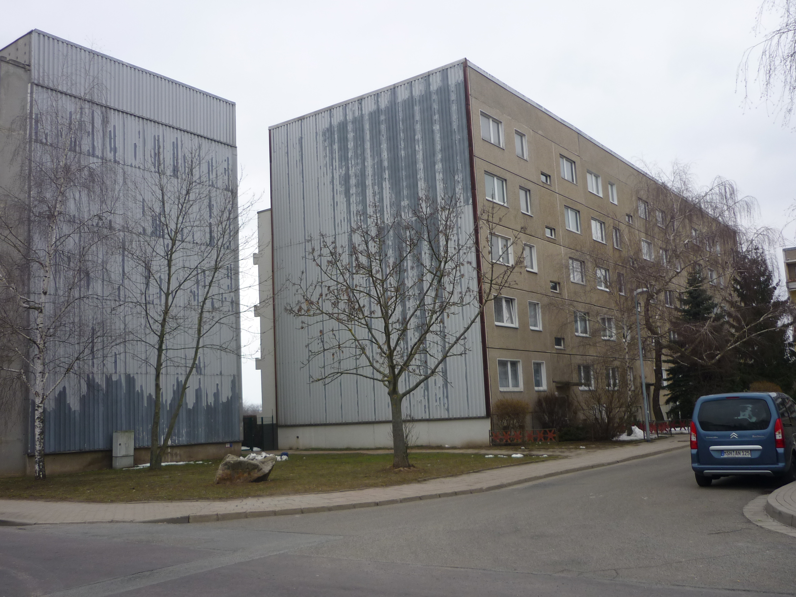 WOBLST